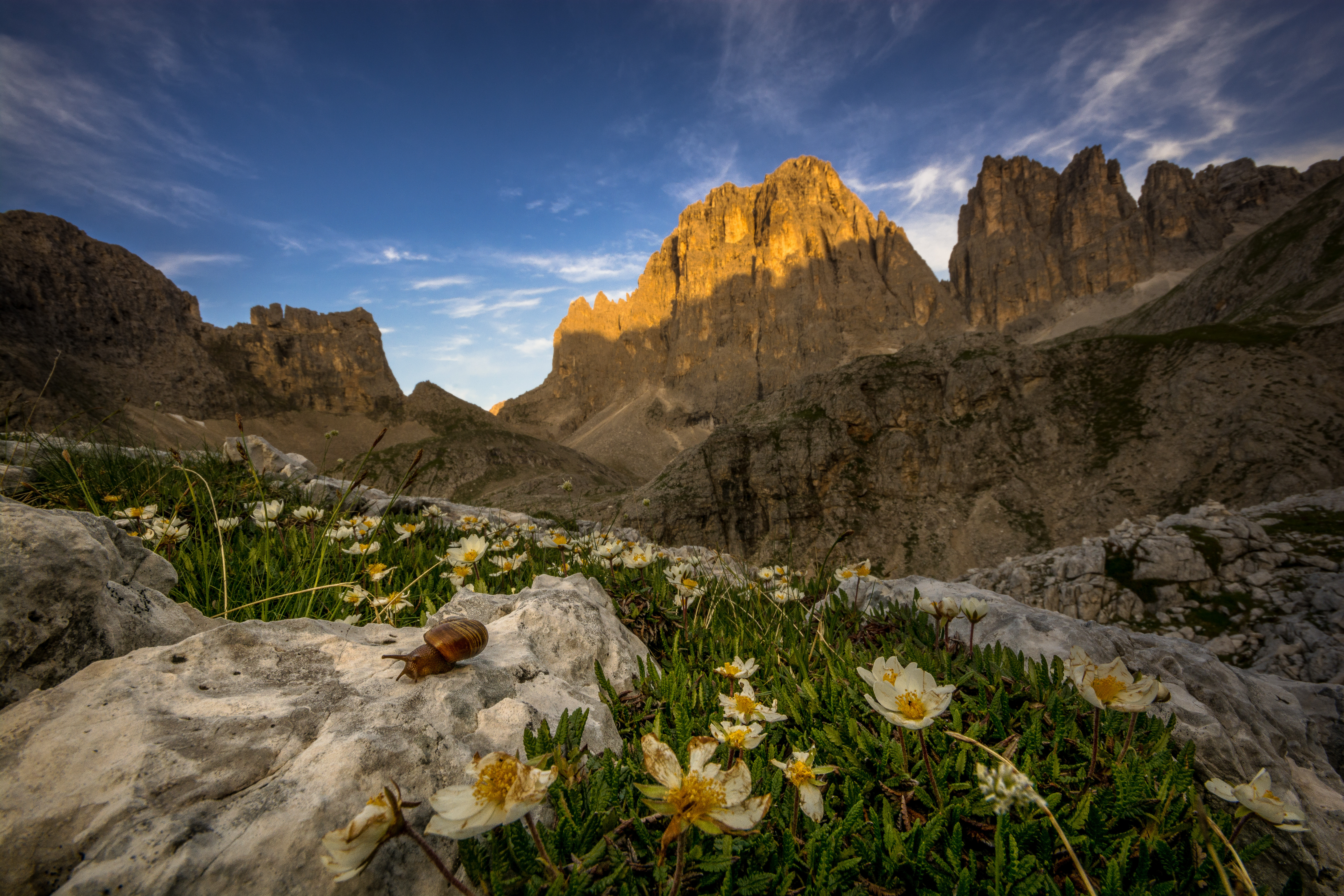 Parco naturale Paneveggio - Pale di San Martino dietro le pale di San Martino dopo una lunga camminata si raggiunge il bivacco Minanzio co il suo spettacolare paesaggio